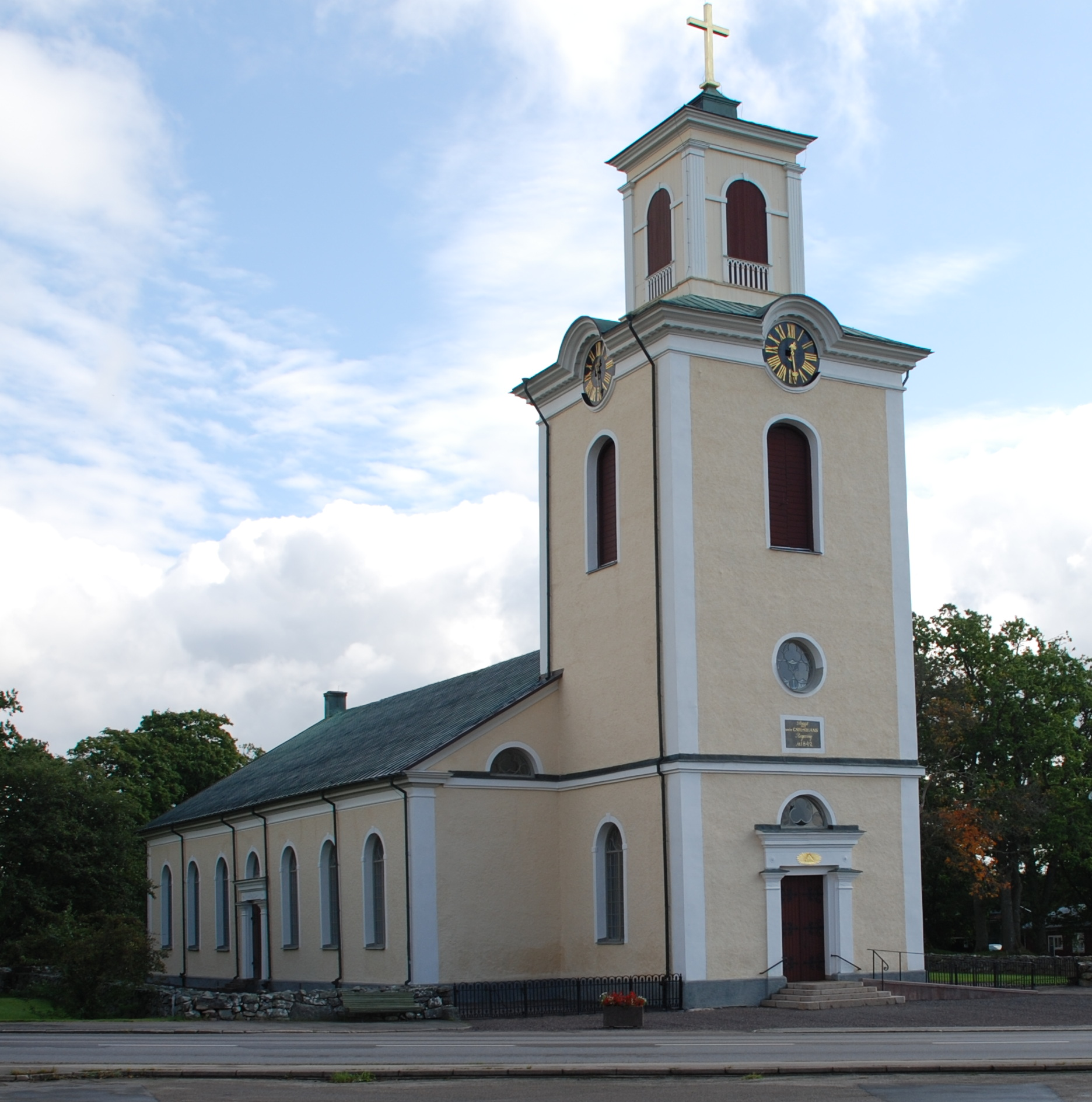 Lenhovda kyrka